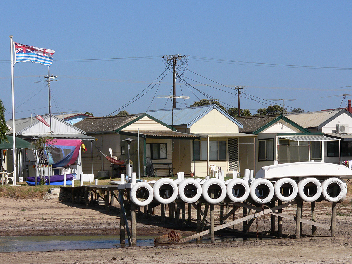 Milang